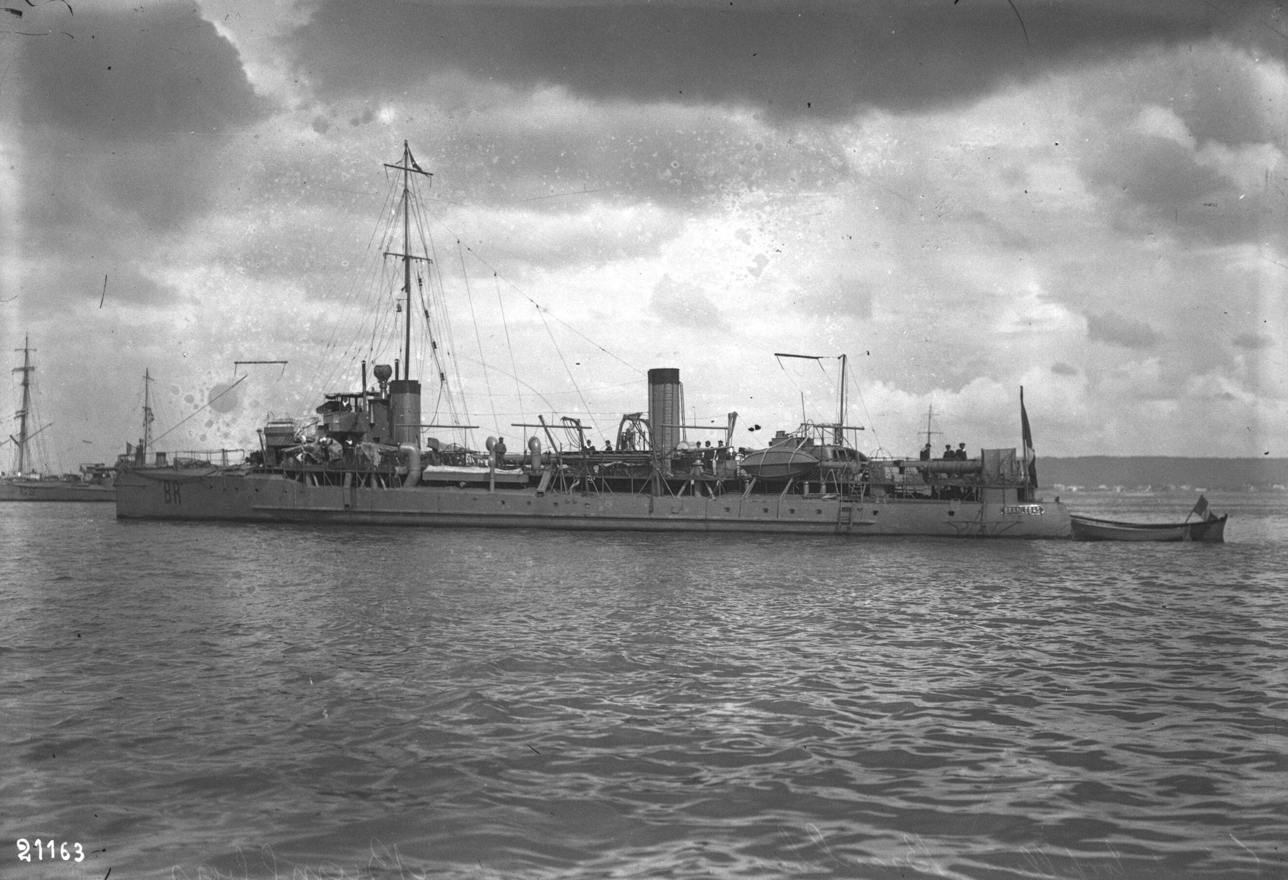 Destroyer français Branle-bas leader ship de classe Branlebas